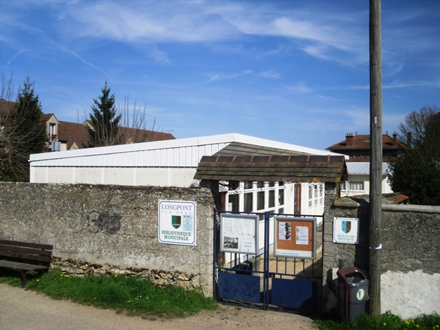 La médiathèque de Longpont-sur-Orge (Essonne, Île-de-France, France).